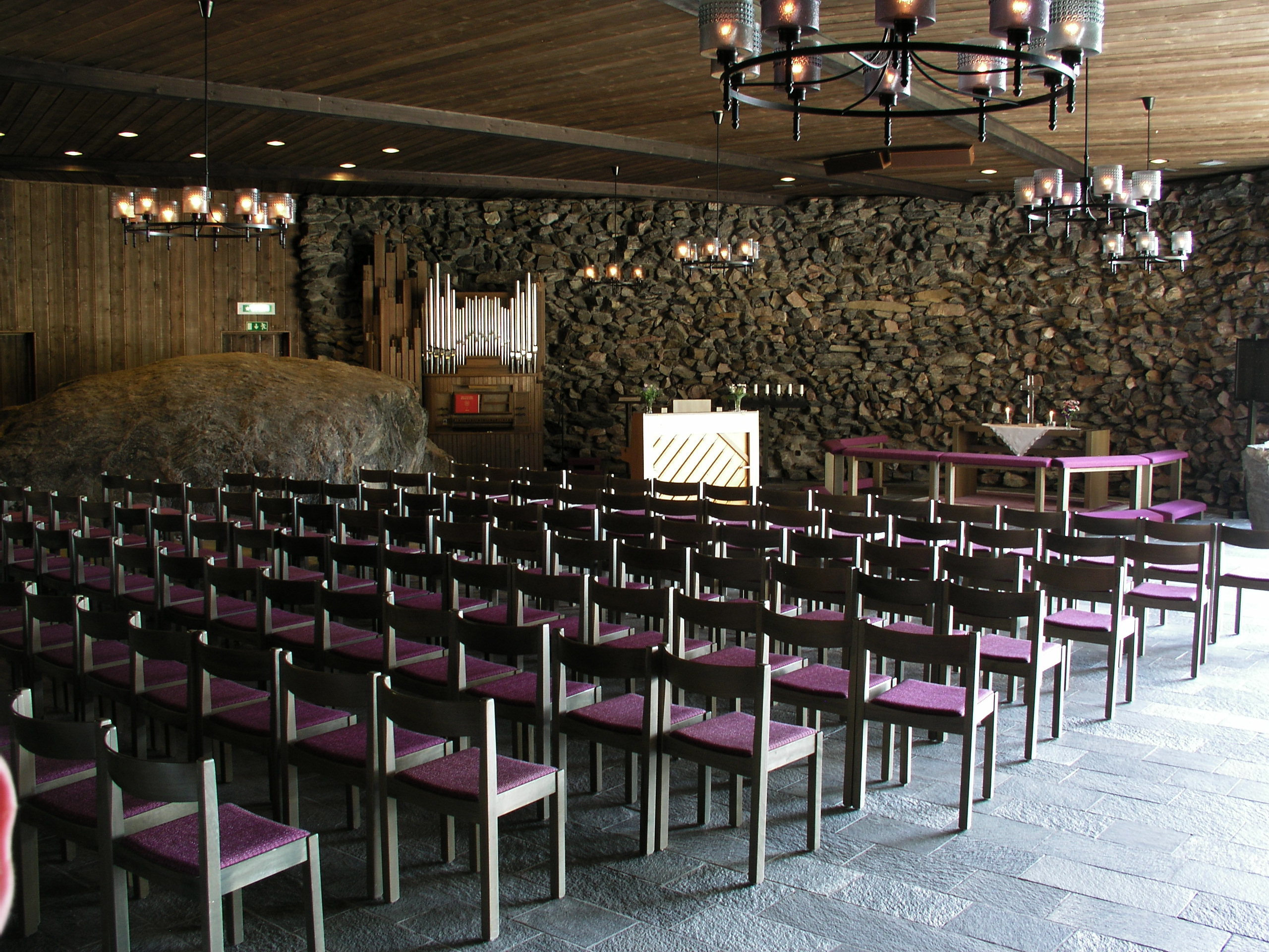 Kolmårdskyrkan. Diocese of Linköping. Norrköpings kommun.